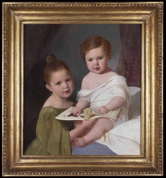 Geschwister-Porträtlabel QS:Lde,"Geschwister-Porträt"